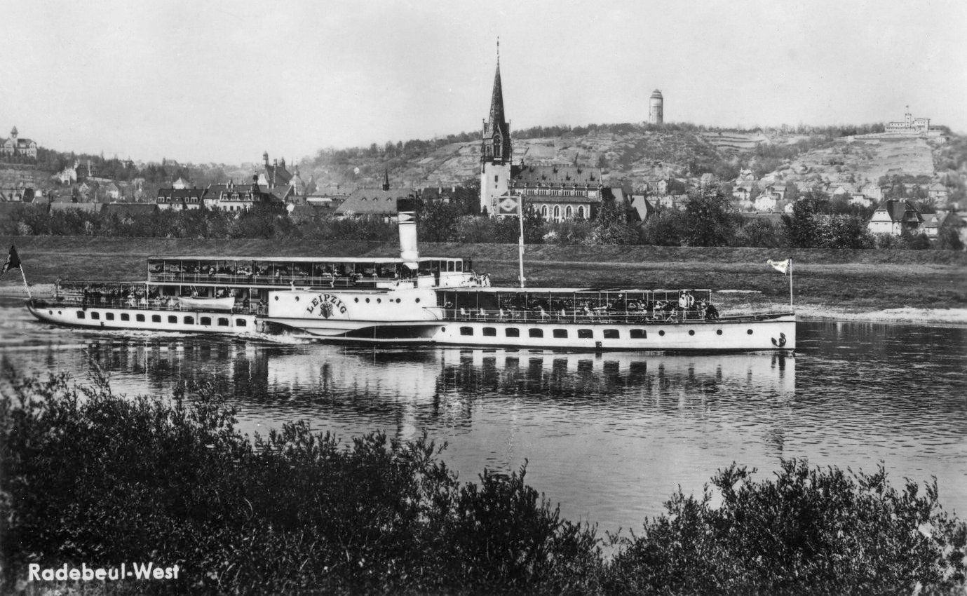 Kötzschenbroda; Kötzschenbroda mit Dampfer Leipzig This postcard is from publisher Brück & Sohn in Meißen ( postcard has a unique number 26565 and is available in a higher resolution at the publisher. This images was uploaded in a cooperation project between Wikipedians and the publisher.